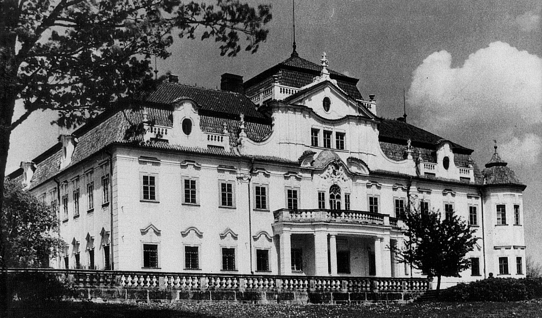 Fotografie zámku Velké Dvorce zachycující průčelí někdy v polovině 20. století